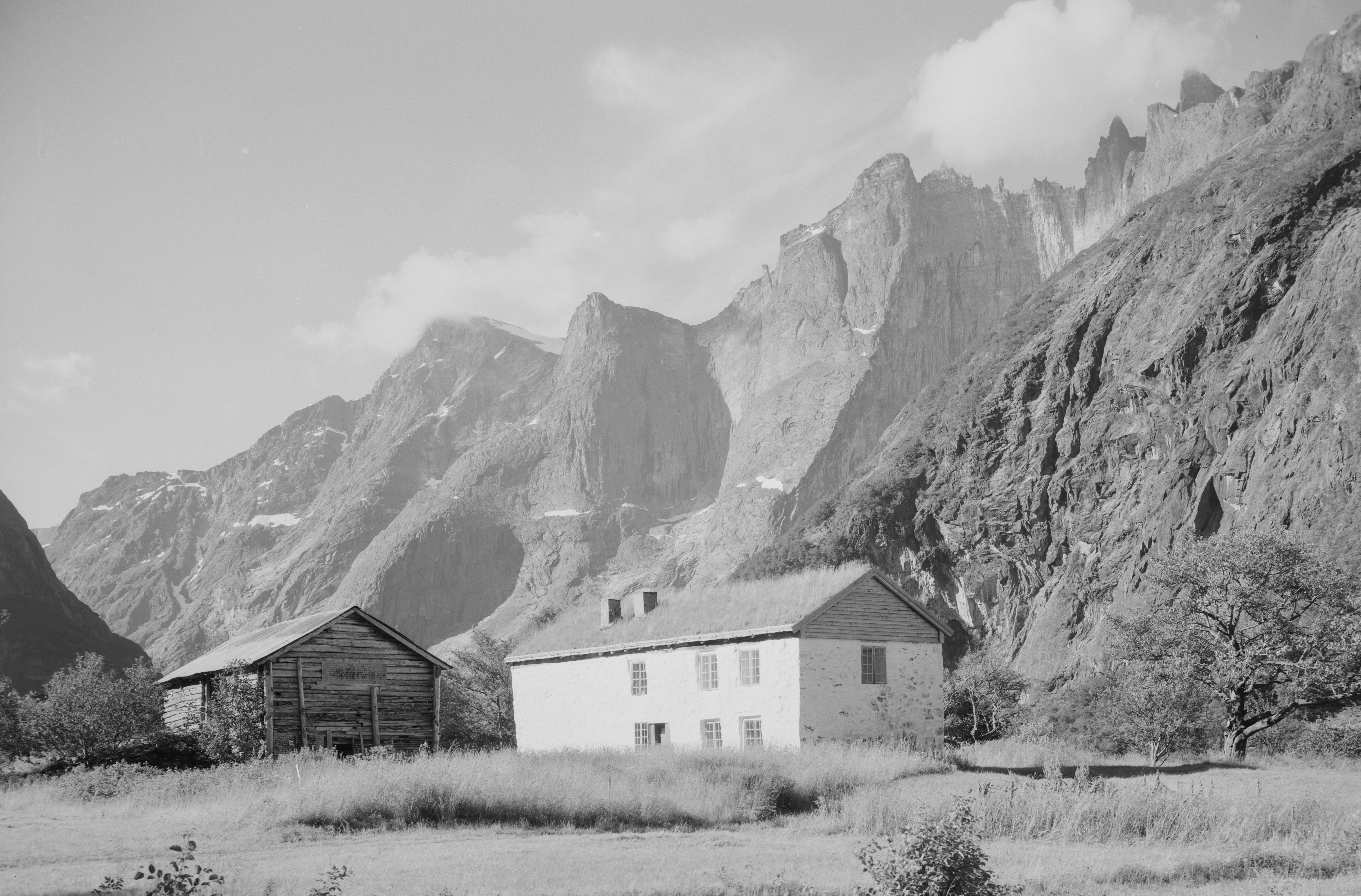 Bildet er hentet fra Nasjonalbibliotekets bildesamling Romsdalen,Trolltindan, Rauma, Møre og Romsdal